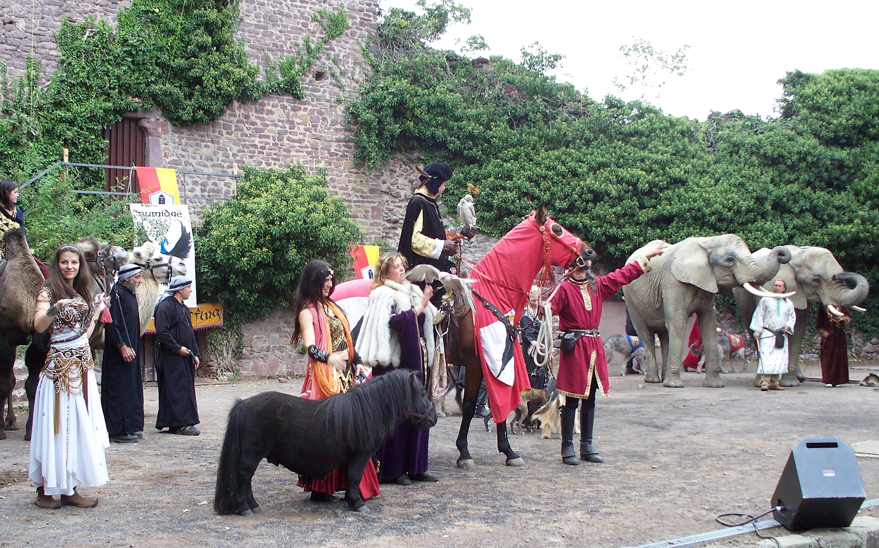 Burg Dreieichenhain. Burgfest und Mittelaltermarkt. Auftritt der Mittelalterdarsteller im Burghof auf der Freilichtbühne.